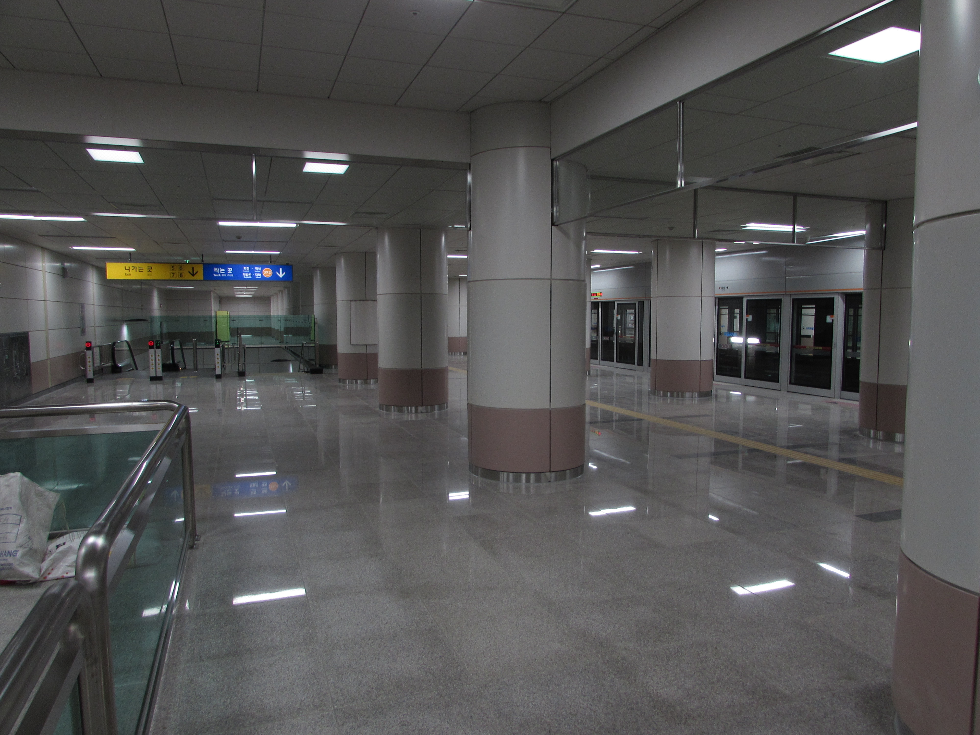 조선말: 수도권 전철 3호선(일산선) 원흥역 오금 방면 승강장.